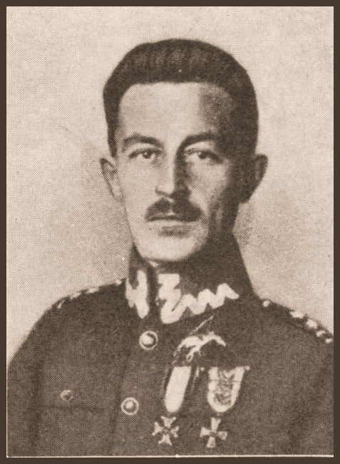 Władysław Toruń